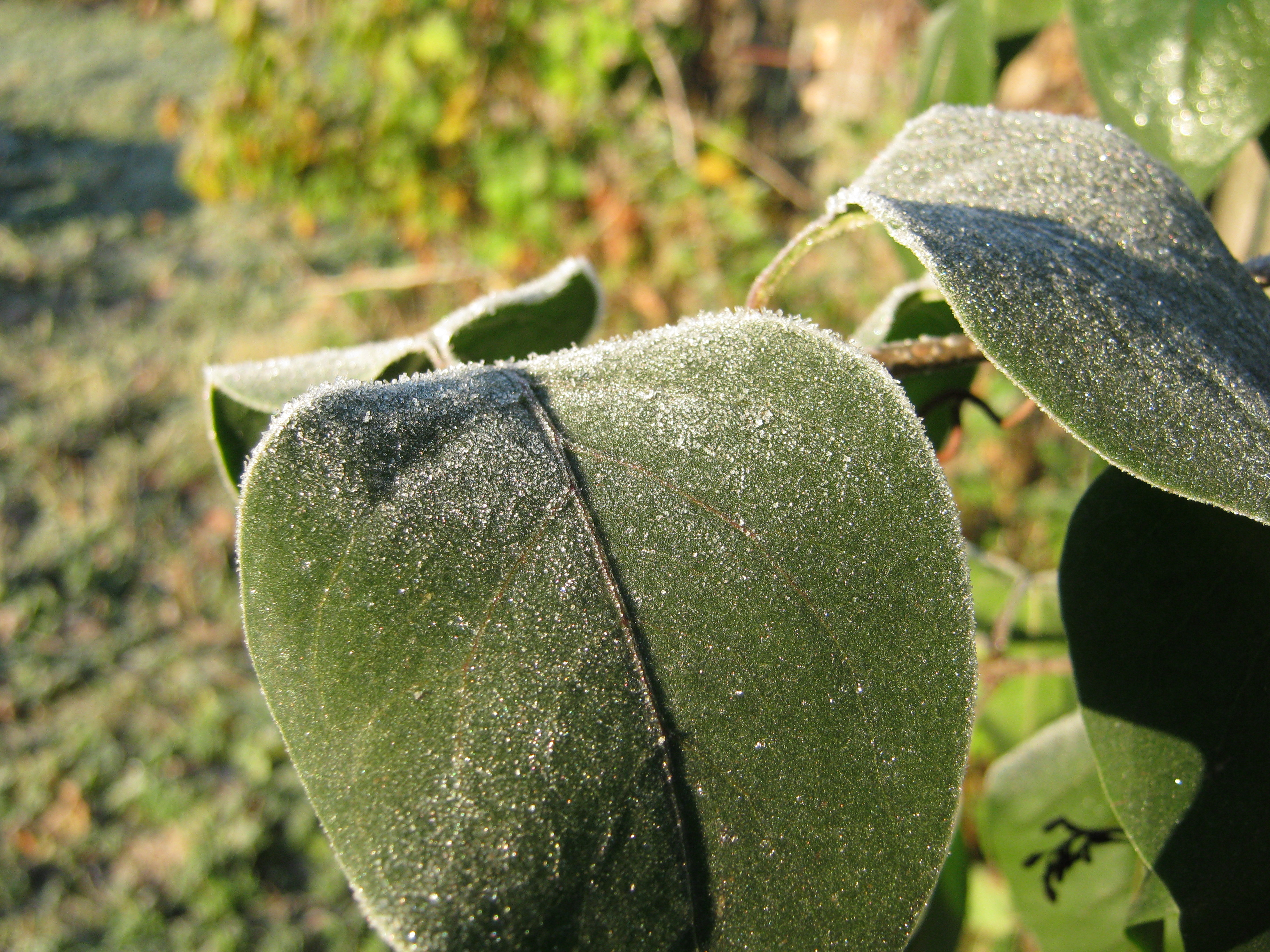 Осінній жовтневий приморозок, с. Петранка, Рожнятівського району, Івано-Франківська обл.